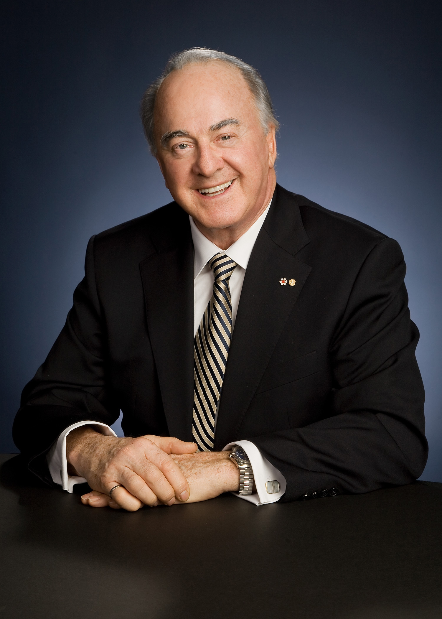 Jean-Guy Paquet